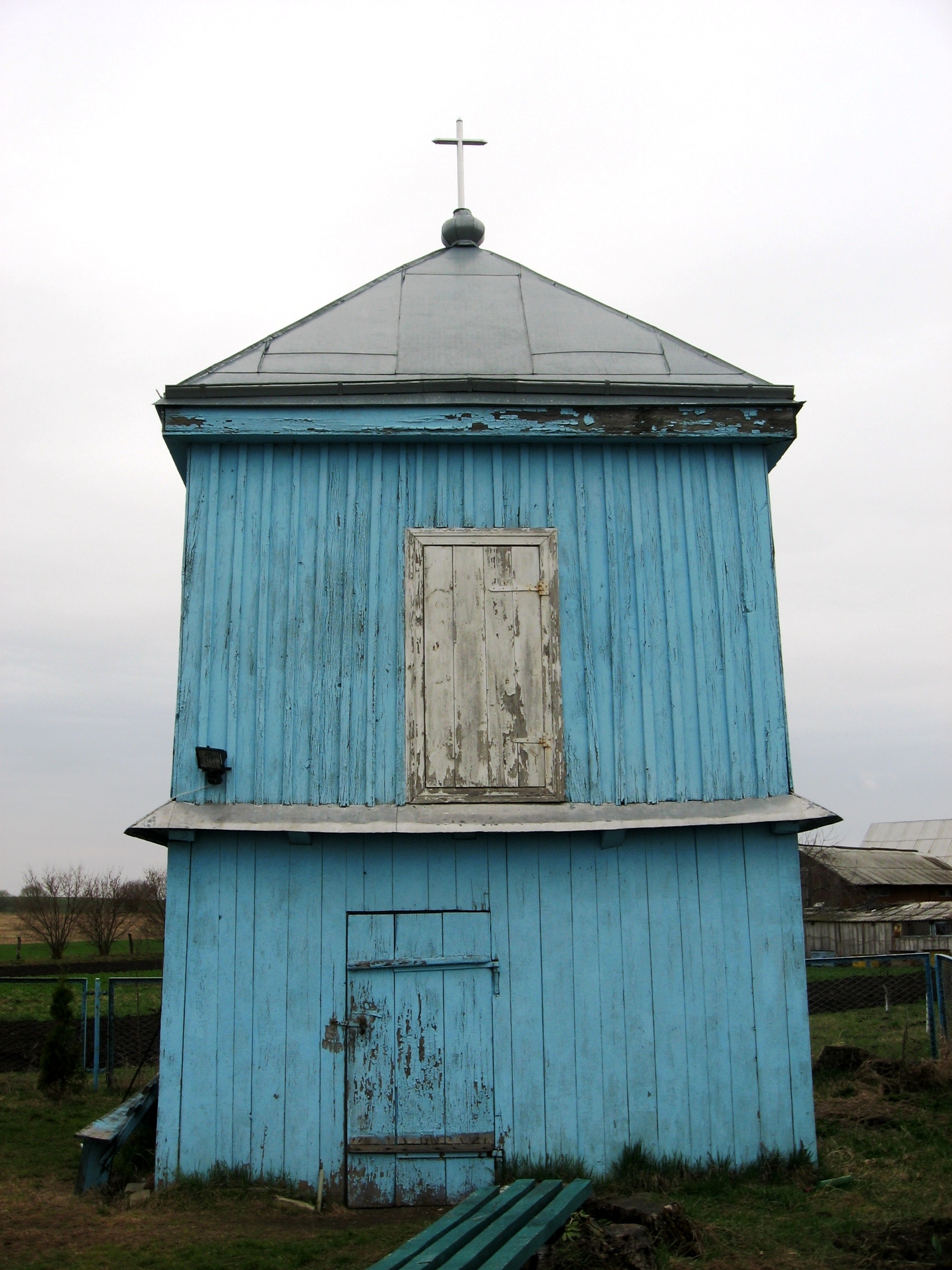 Смолигів, Луцький район. Дзвіниця Миколаївської церкви, XVIII cт.